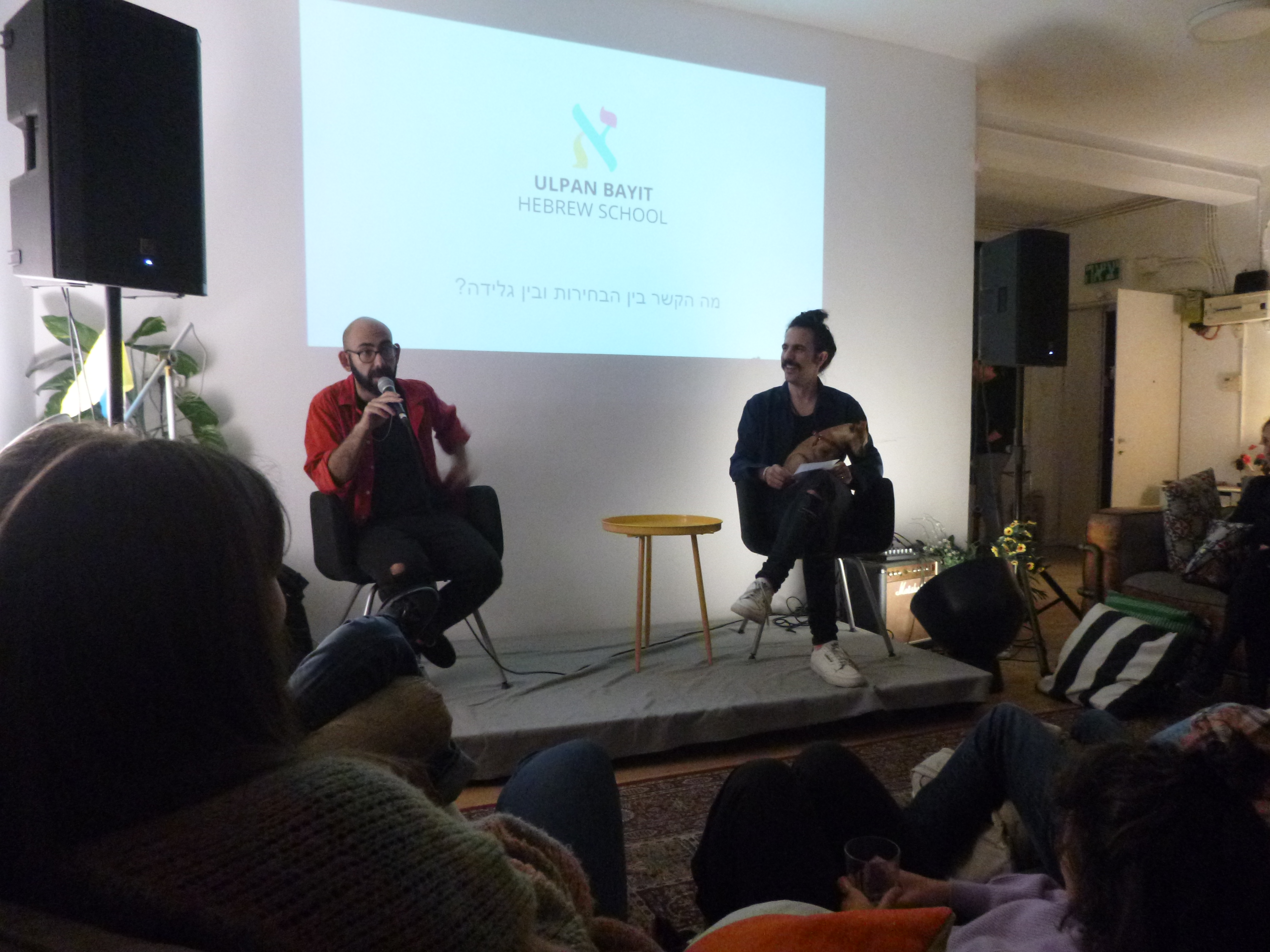 Podiumsveranstaltung mit einem Journalisten von Haaretz in einem linksliberalen Ulpan in Tel Aviv-Jaffa